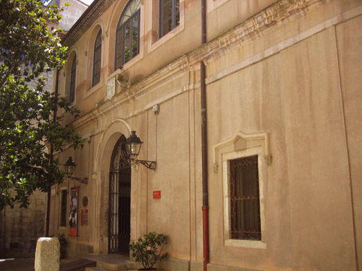 Arxiu Municipal de Girona